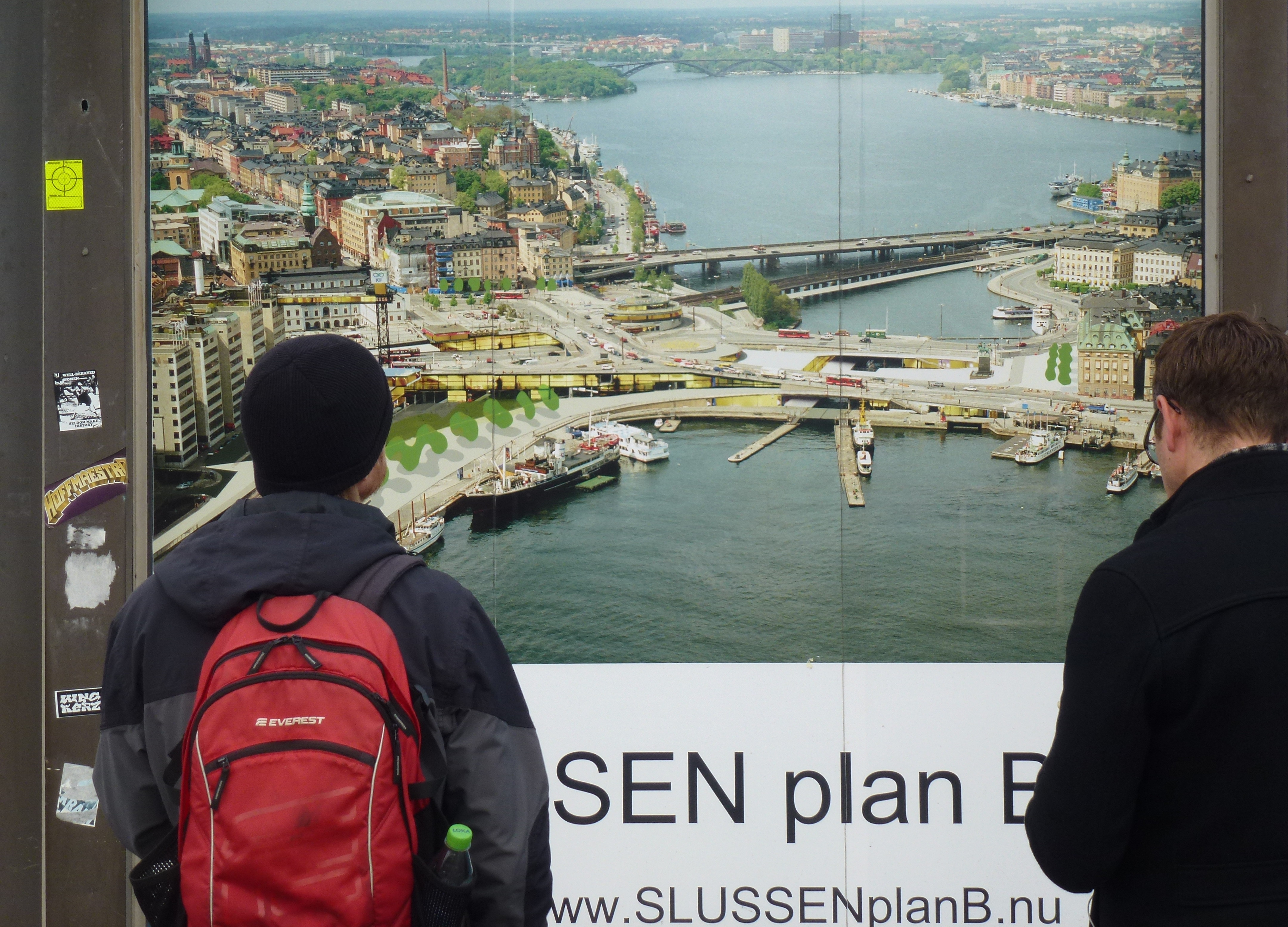 Slussen plan B på Restaurang Strömmens skyltfönster